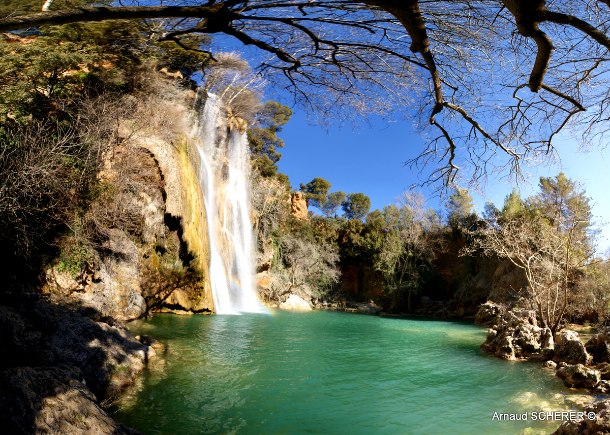 La cascade est une chute d'eau située à Sillans-la-Cascade (Var).